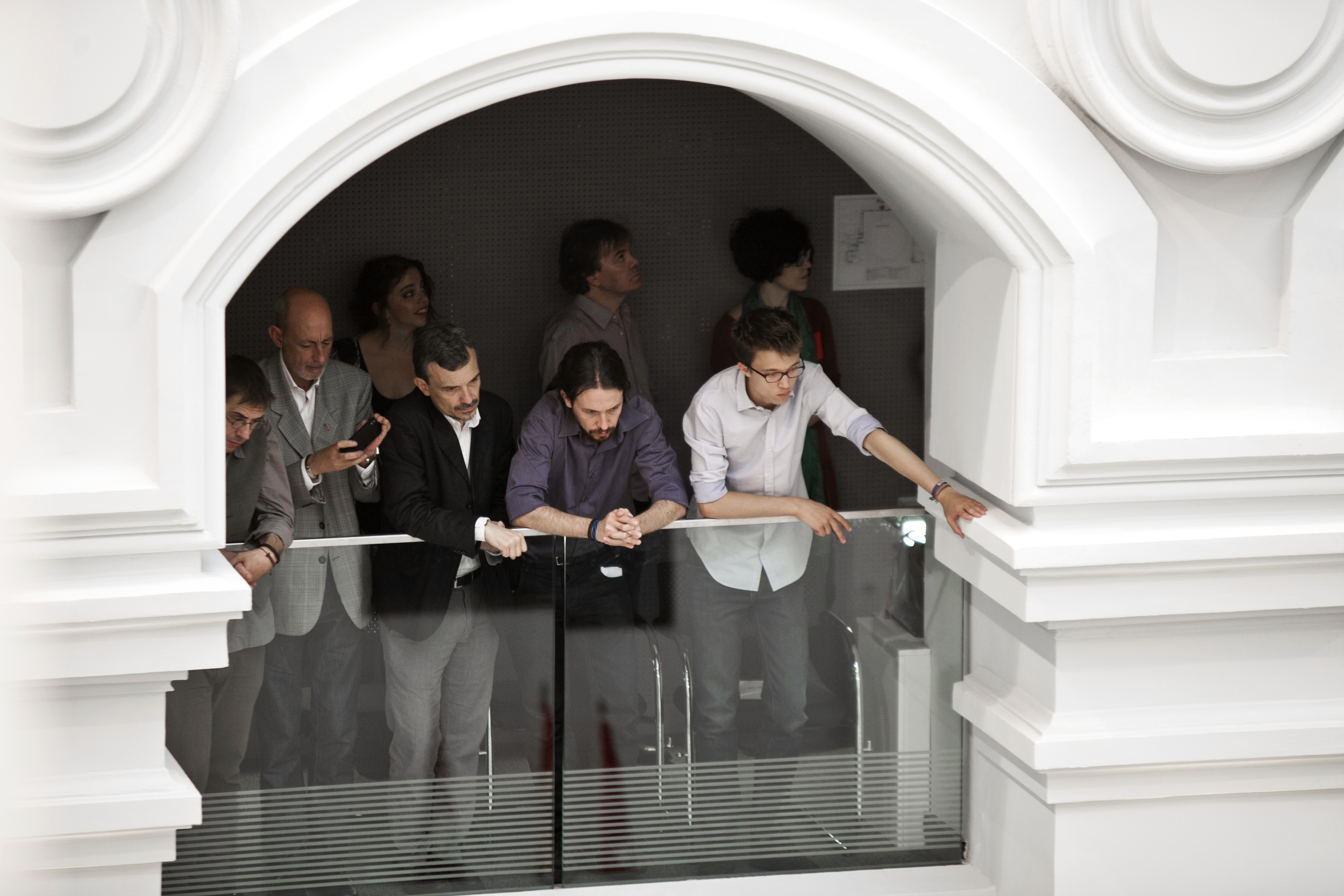 Investidura Manuela Carmena como alcaldesa Madrid